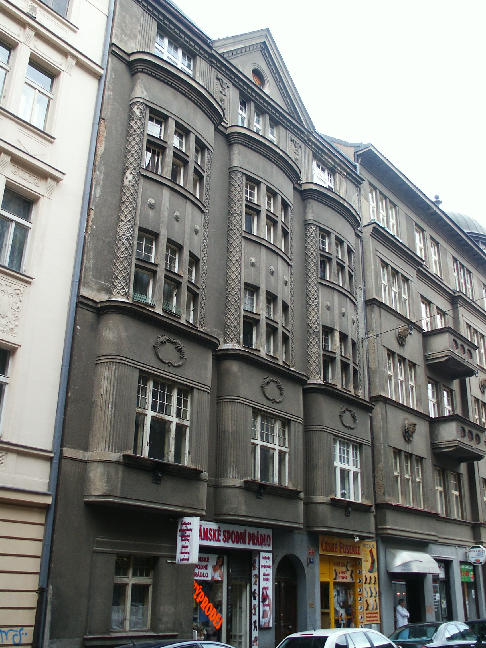 Měšťanský dům, Praha 7-Holešovice, Haškova 1176/4